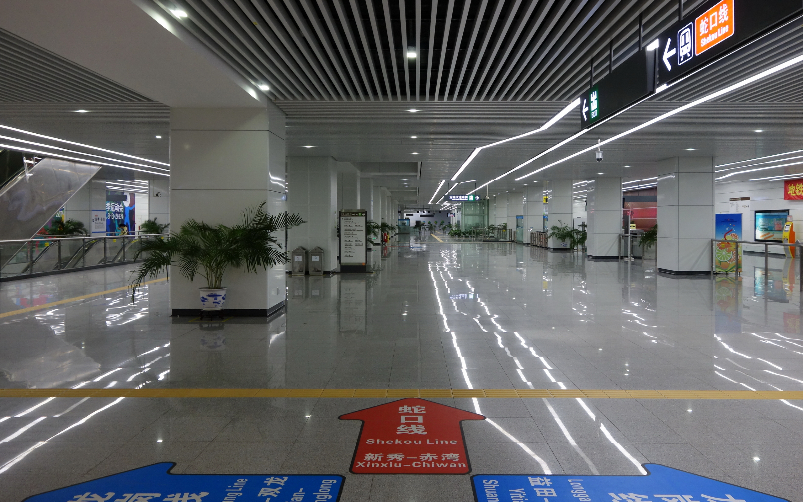 深圳地铁福田车站站厅